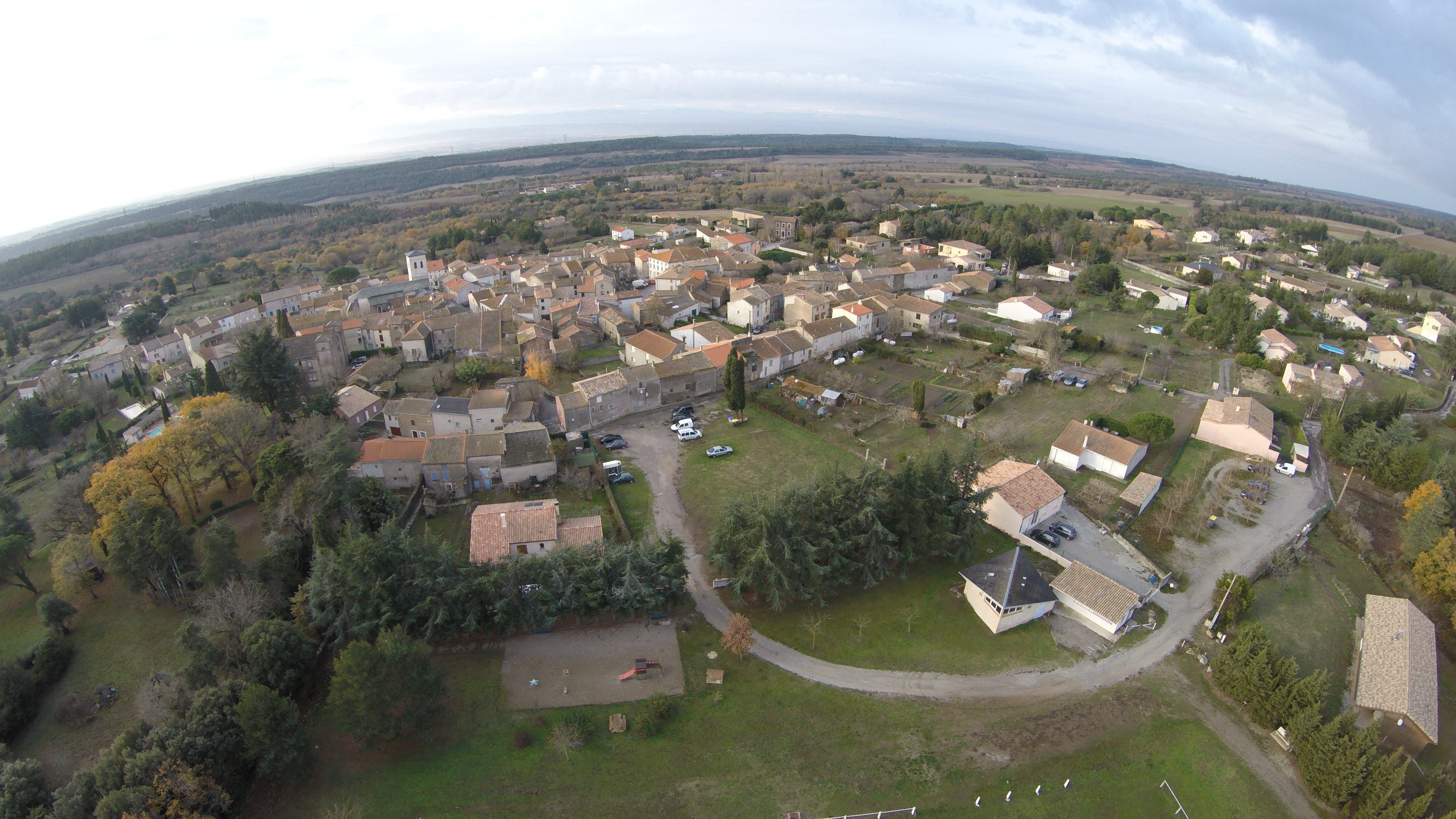 vue aérienne de Villardonnel